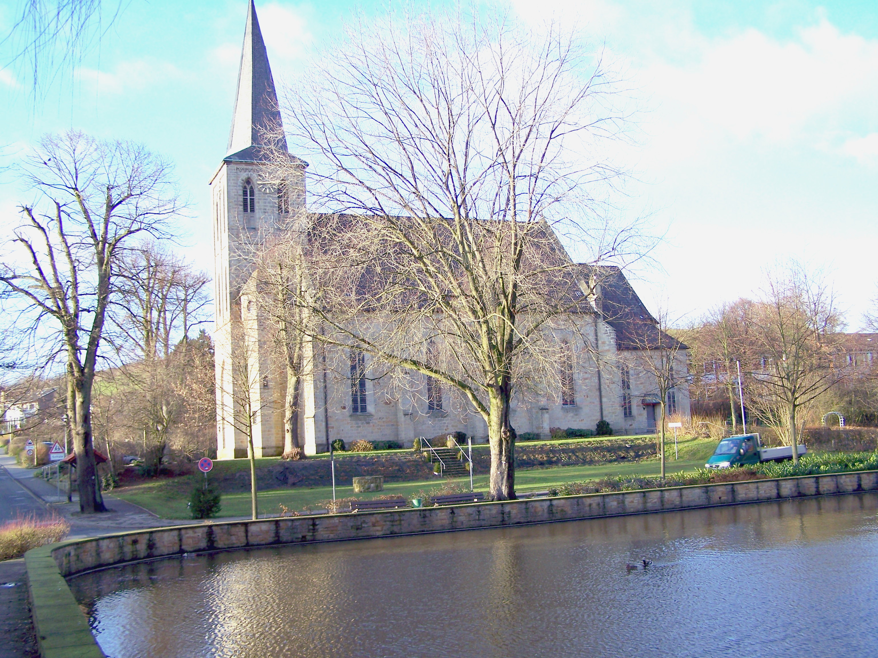 Mühlenteich Brochterbeck und kath. Kirche St. Peter und Paul[1]